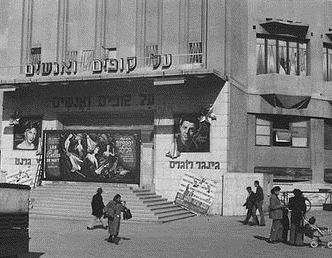 קולנוע מוגרבי, חזית-צד